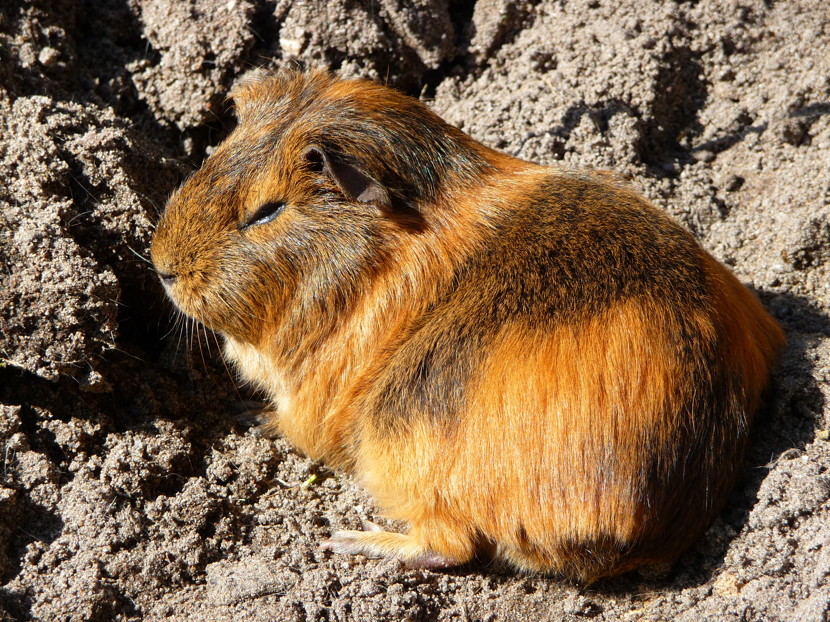 Dösendes Hausmeerschweinchen (Cavia porcellus)